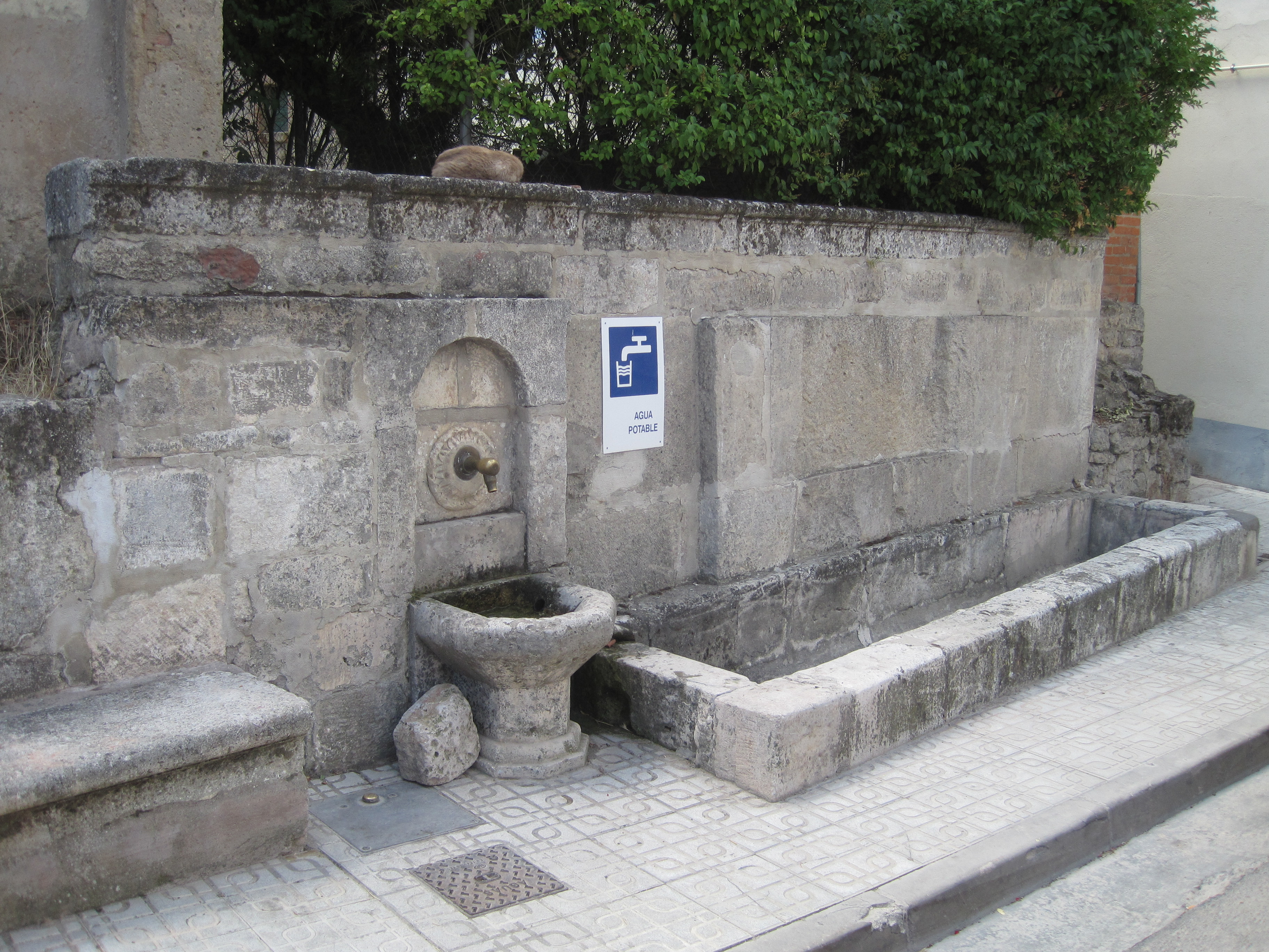 Pilón de Villatoro. Antiguamente, la ropa era lavada en esta fuente.